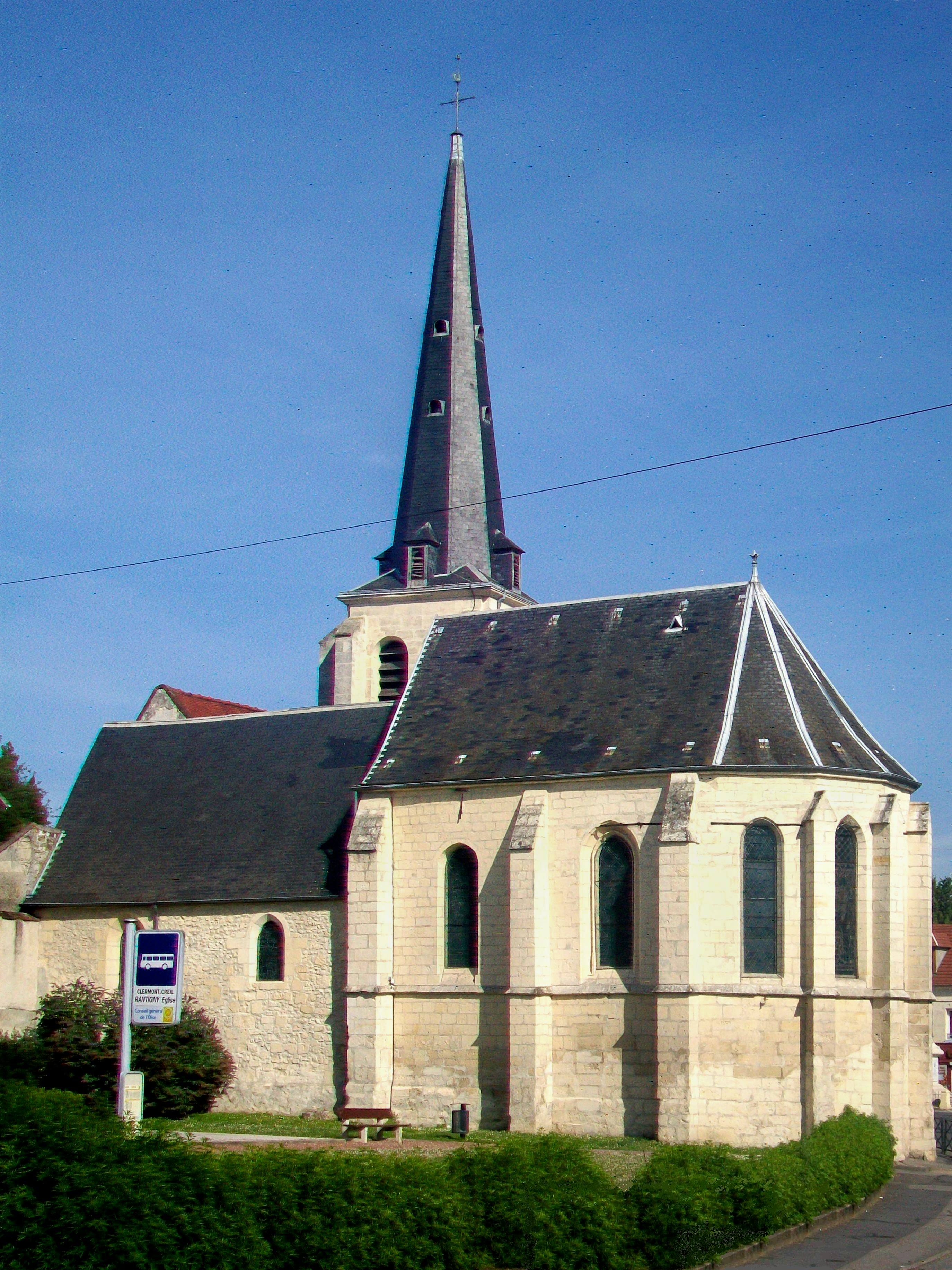 Vue de l'église depuis le sud.